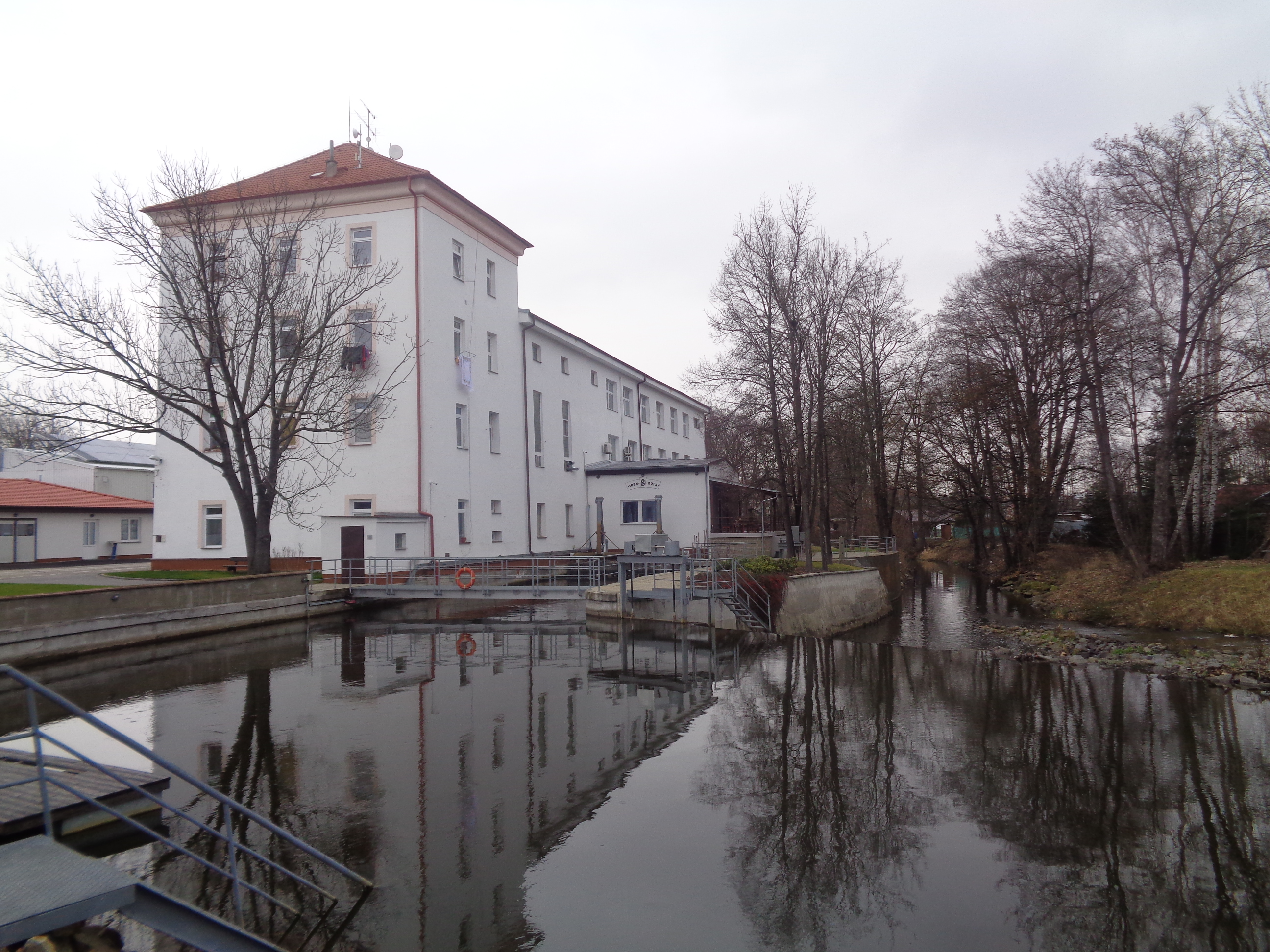 Stecherův mlýn u Litvínovic